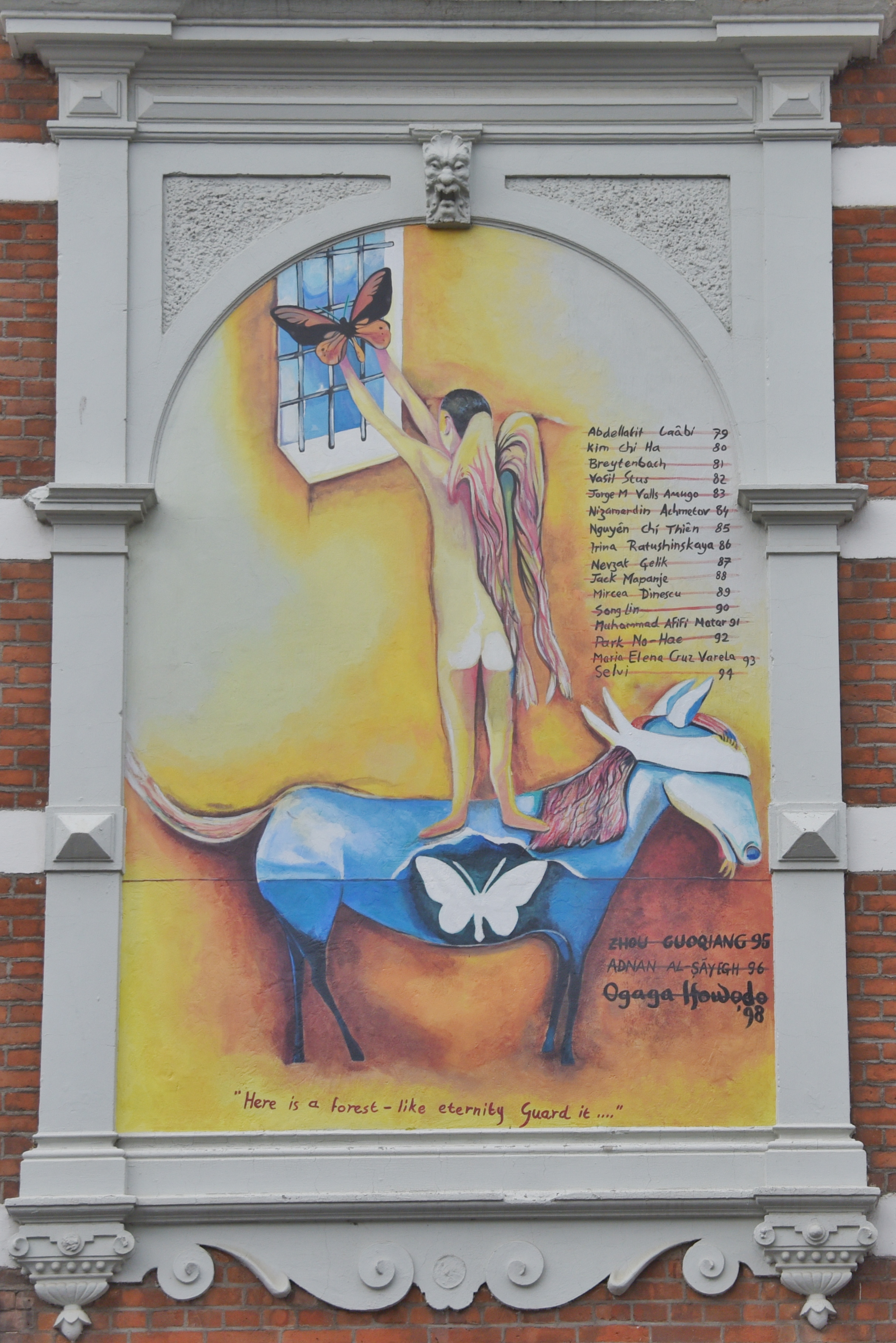 Wandmalerei von Breyten Breytenbach, Die Arbeit zeigt einen gefangenen Schriftsteller, der sich nach Freiheit sehnt. Neben dem Bild befindet sich eine Liste mit Namen von Schriftstellern, die wegen ihrer Arbeit inhaftiert waren.Nach Freilassung wurden die Namen durchgestrichen.